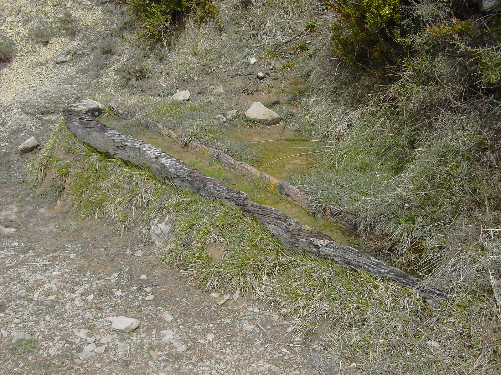 Aragonés: Cumo (palabra aragonesa), tronco vaciado que se emplea para abrevar el ganado. Pertenece a la familia de recipientes conocidos en aragonés como bazías (del latín vacivus), todos ellos caracterizados por lo que su nombre indica, ser troncos o piezas de madera vaciados o similares.